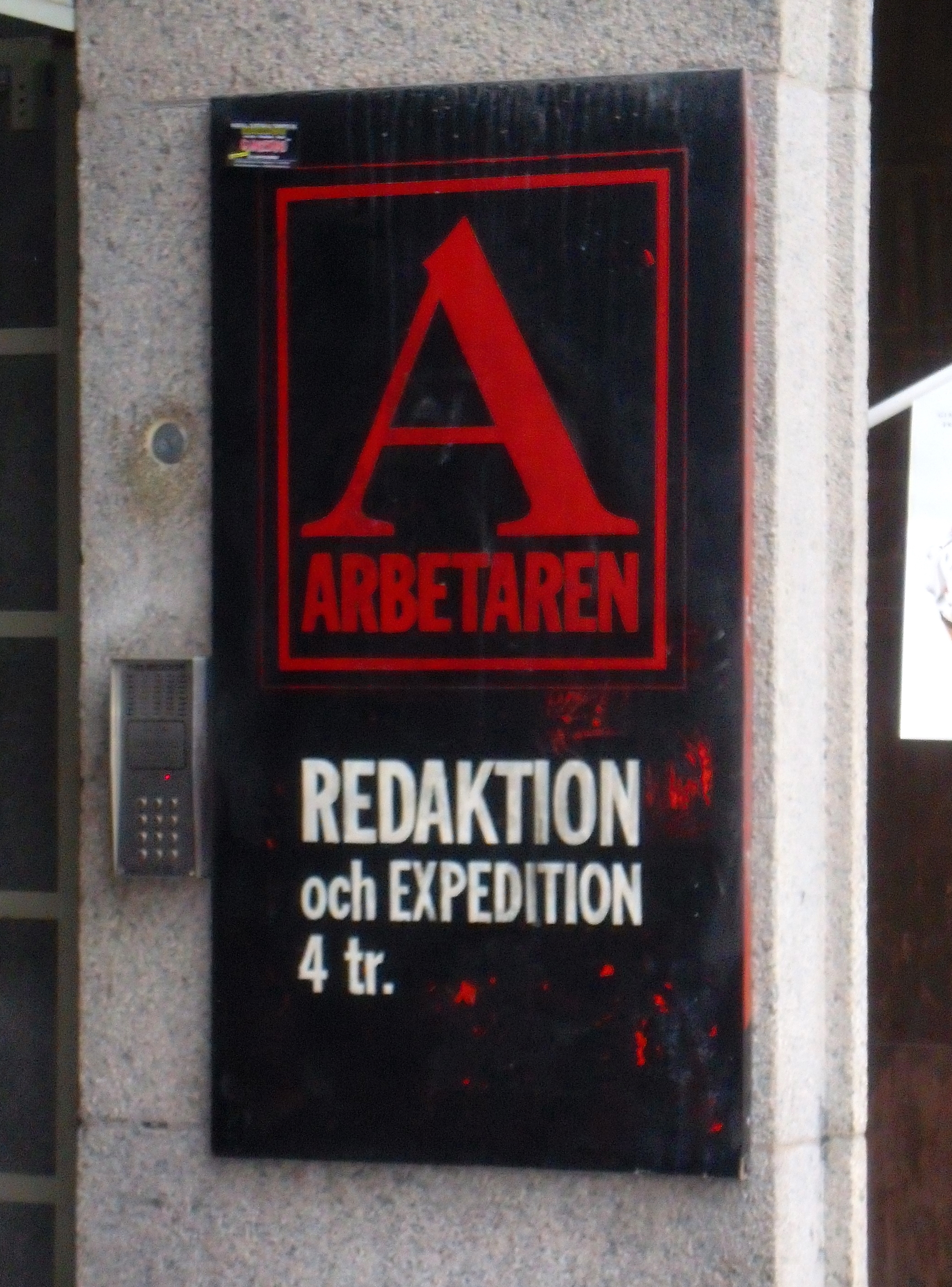 Tidningen Arbetarens redaktionsskylt, Sveavägen Stockholm